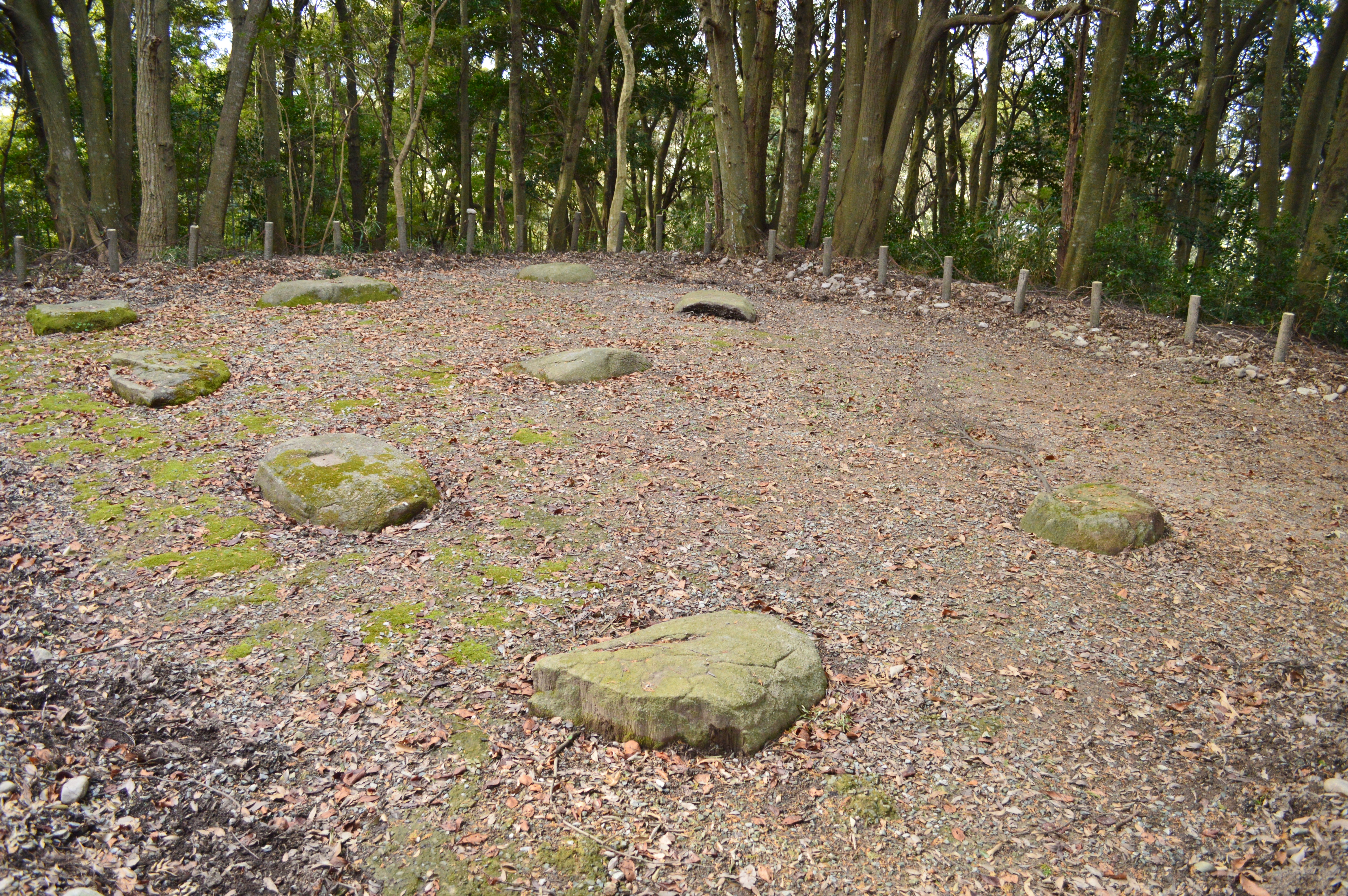 怡土城 第5望楼跡